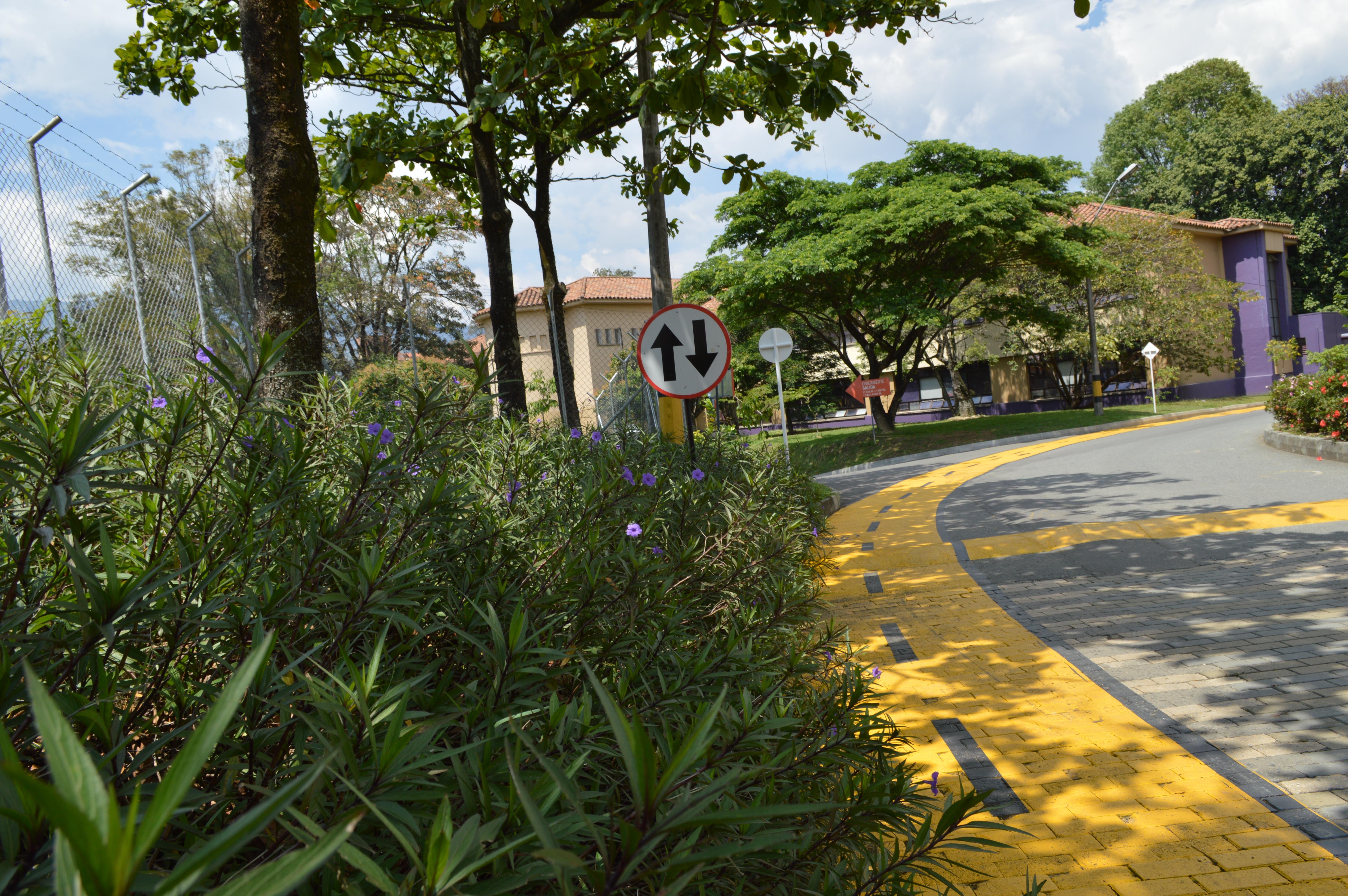 Foto lateral